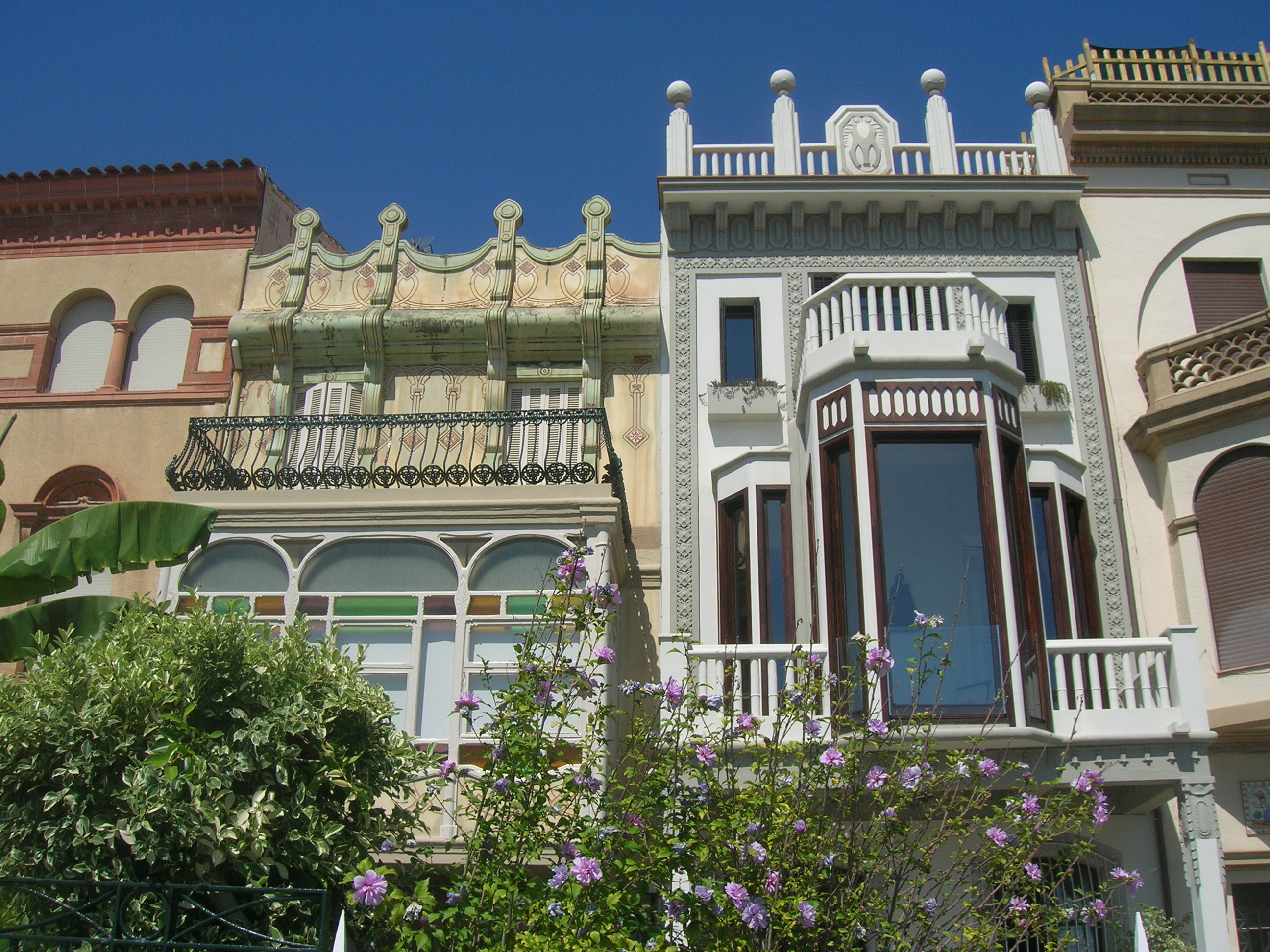 Casa al carrer Sant Pau, 7 (Vilassar de Mar)